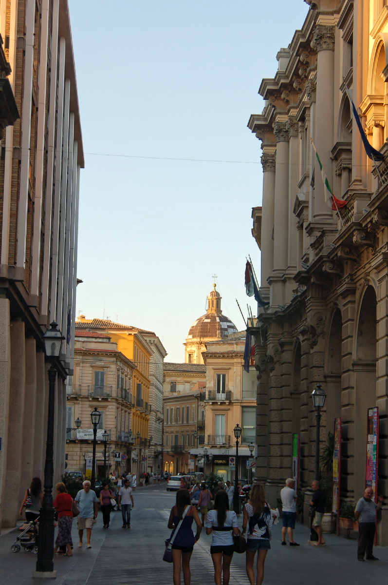 Chieti City 2011